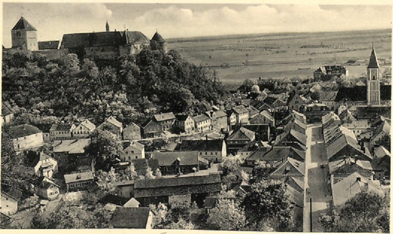 Wörth Donau Blick auf die Ludwigstraße 1910 Scan Postkarte